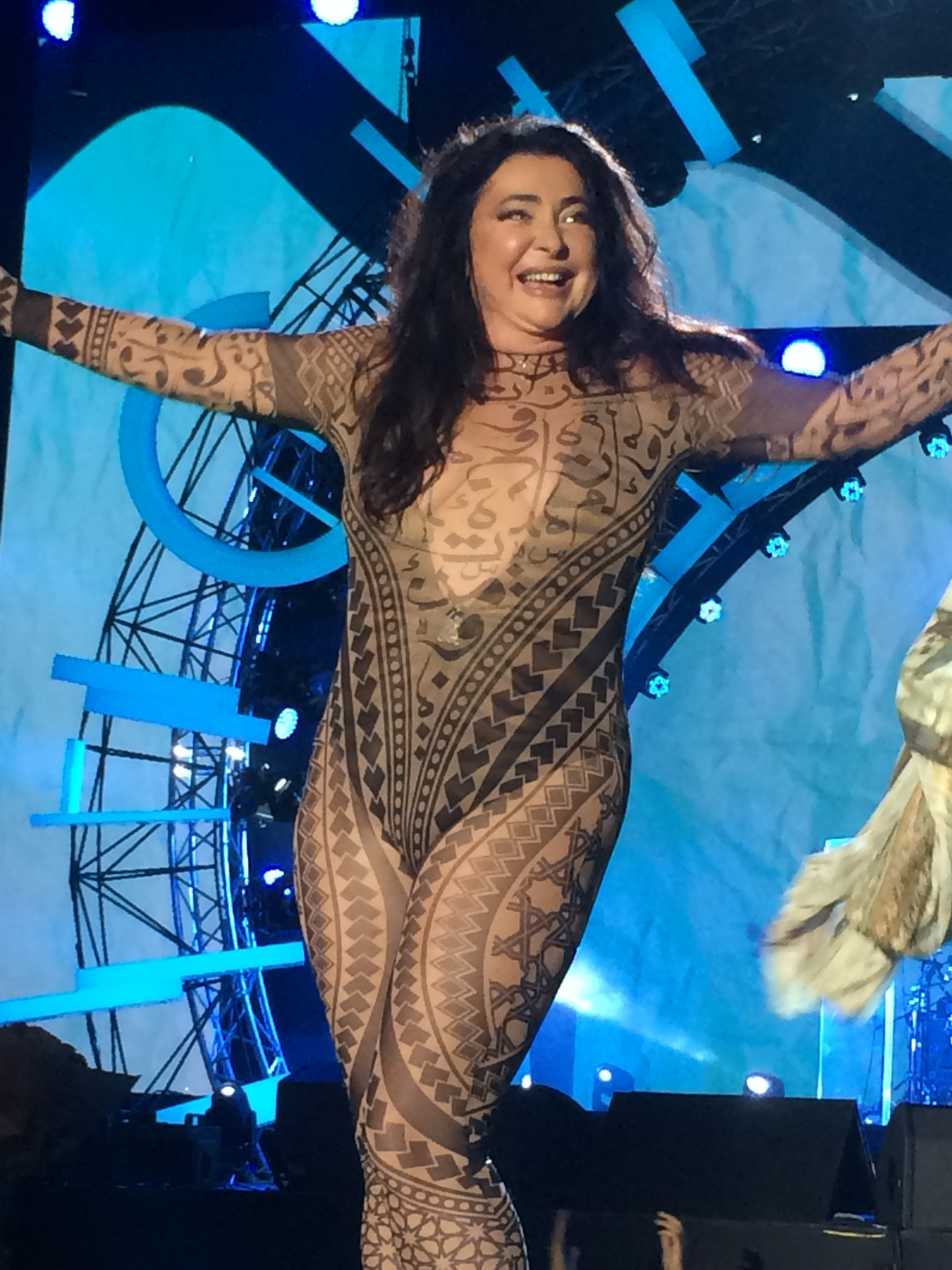 Lolita Milyavskaya JARA17